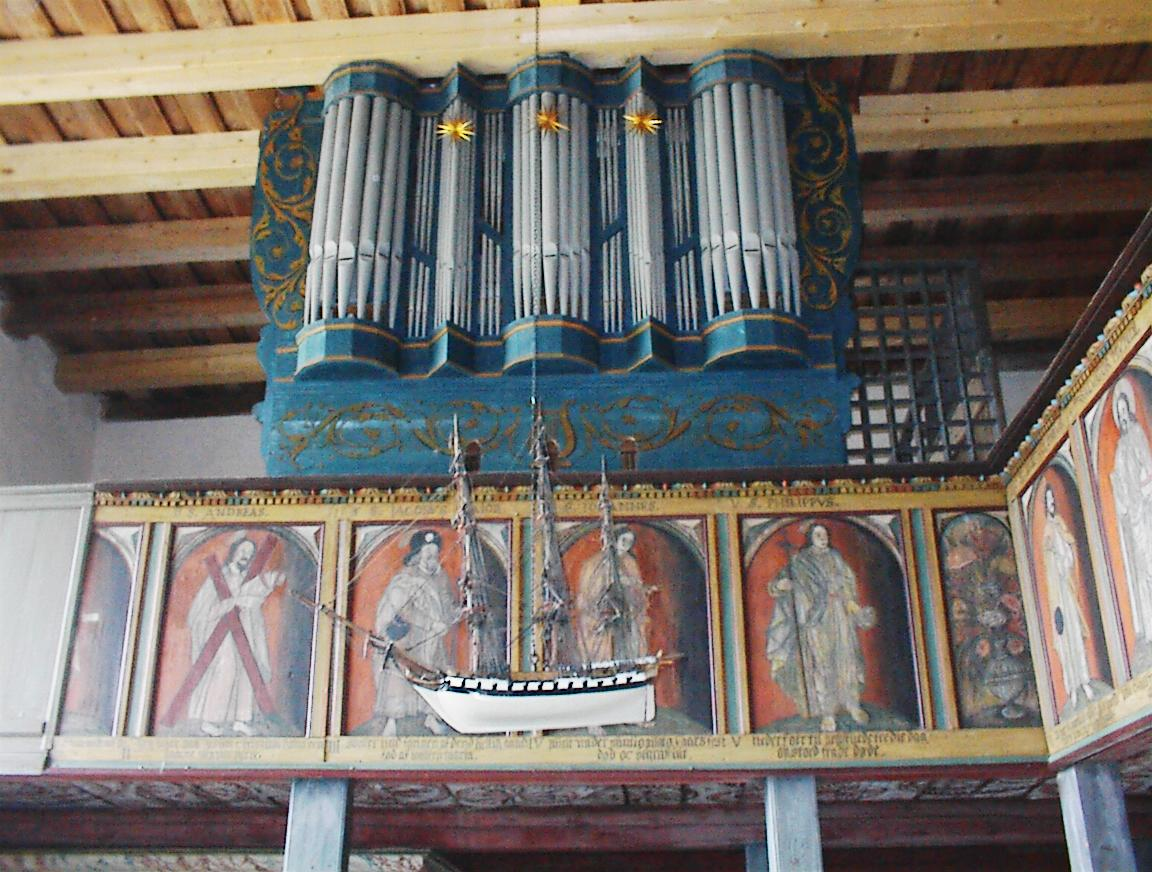 Orgel, kirkeskip, Skoger gamle kirke, Drammen